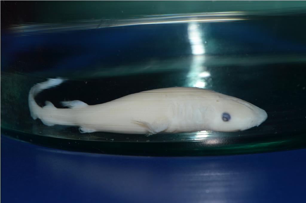 ลูกฉลามขี้เซาตกลูกที่ Songkhla Aquarium